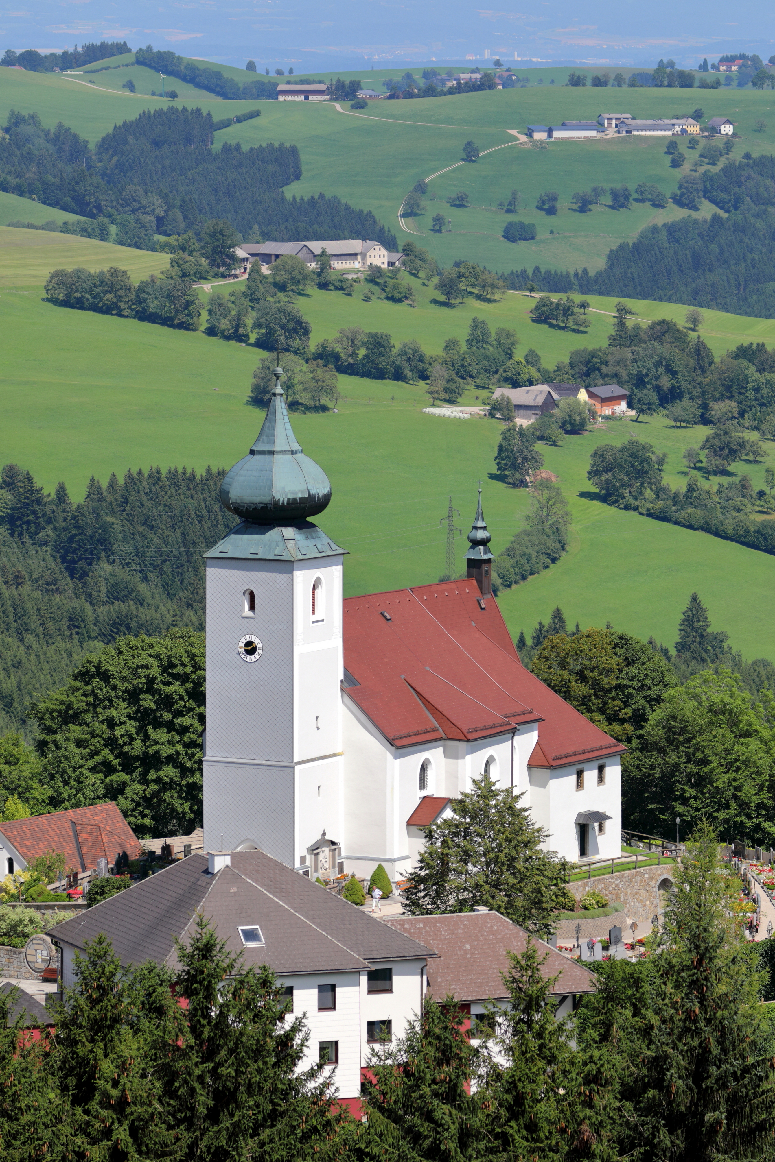 Südwestansicht der röm.-kath. Pfarrkirche hl. Leonhard in St. Leonhard am Wald, ein Ortsteil der niederösterreichischen Stadtgemeinde Waidhofen an der Ybbs.Die weithin sichtbare in erhöhter Lage errichtete Kirche ist eine spätgotische Hallenkirche mit einem leicht eingezogenen Chor. Der mächtige vorgestellte Westturm stammt aus dem 15. Jahrhundert und hat eine barocke Haube.